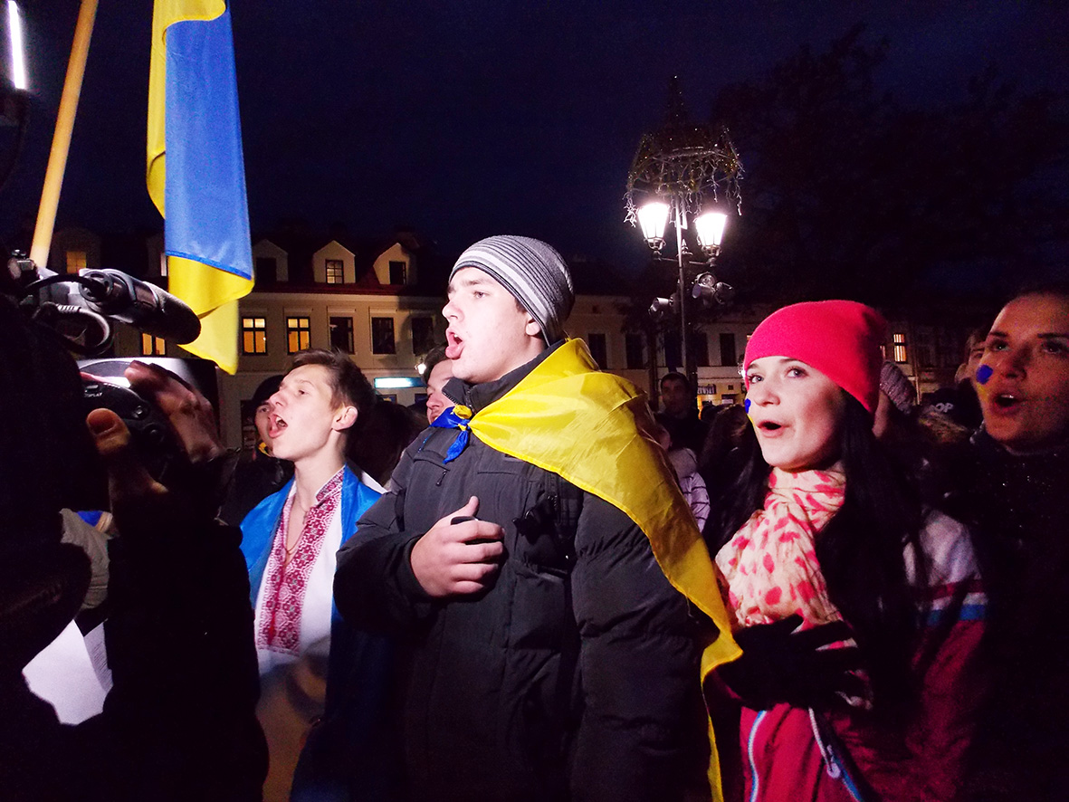 Євромайдан на центральній площі Ряшева